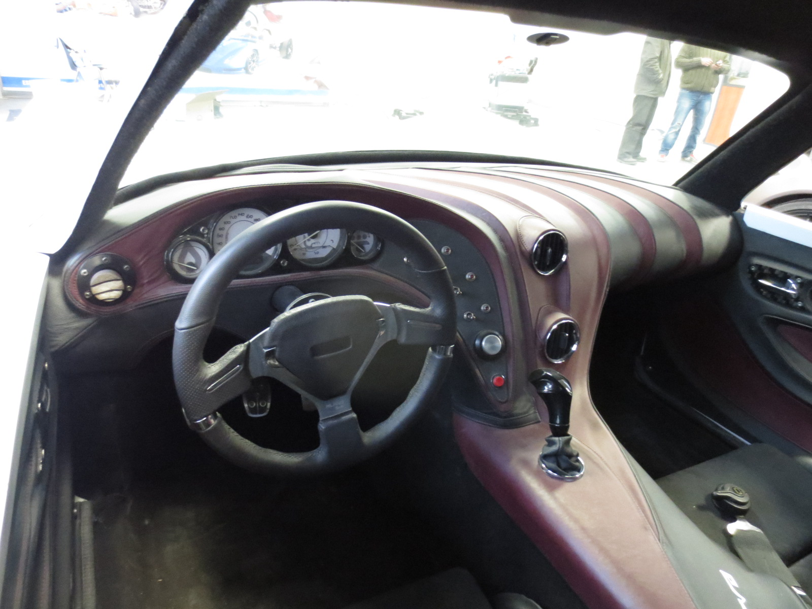 Sbarro Essenza - Show room de l'école Espera Sbarro de Montbéliard